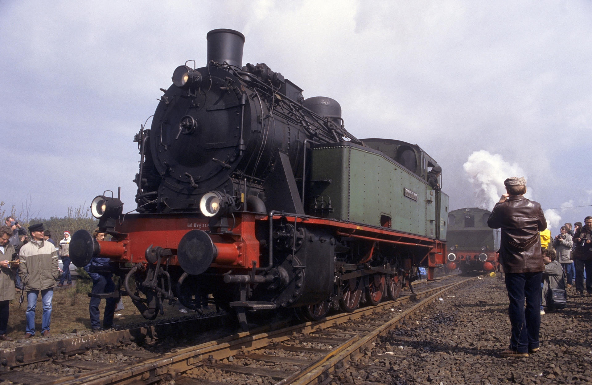 Norddeutsches Eisenbahnjubiläum, Wittingen, 14.04.1985